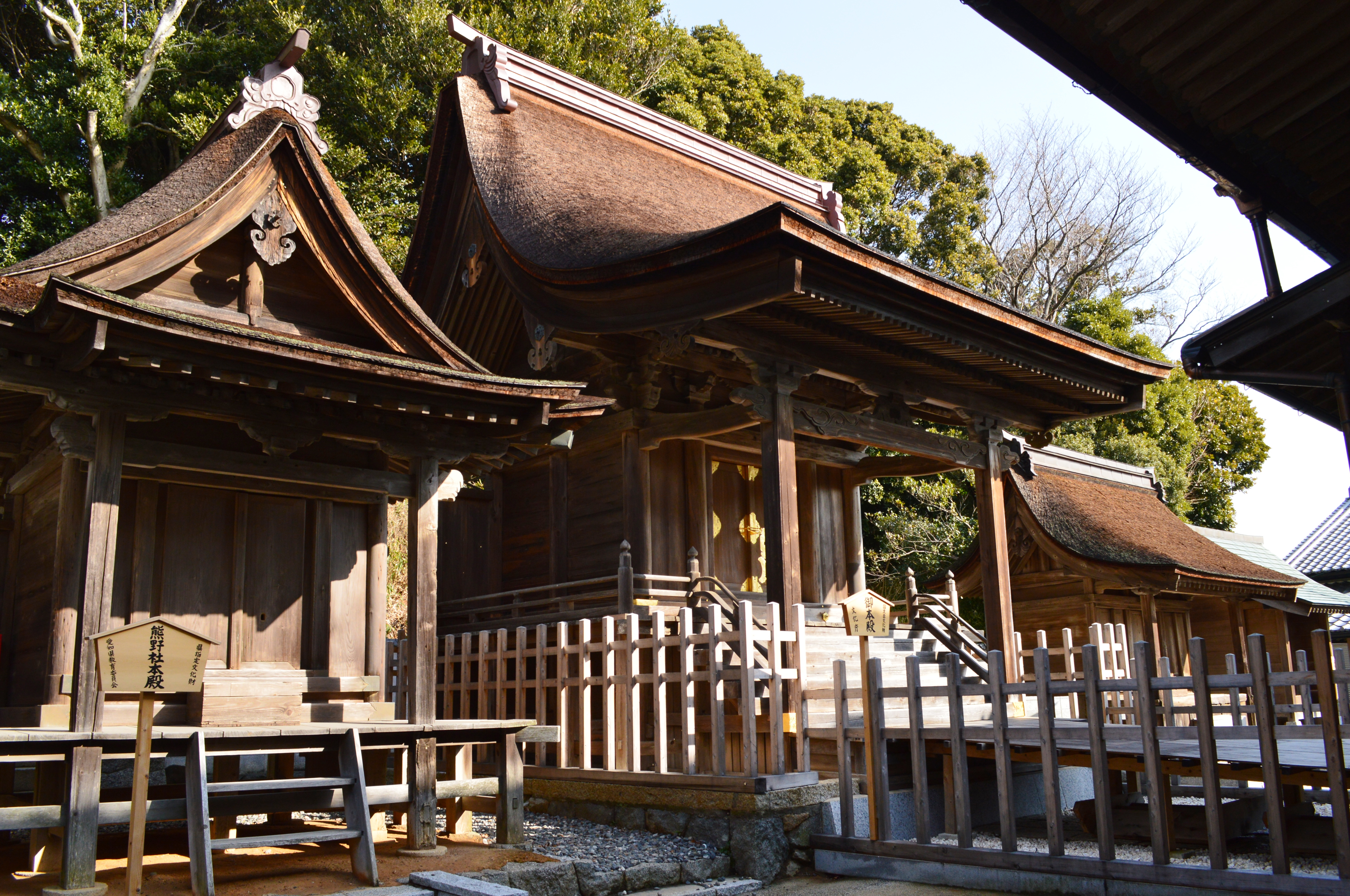 幡頭神社 本殿